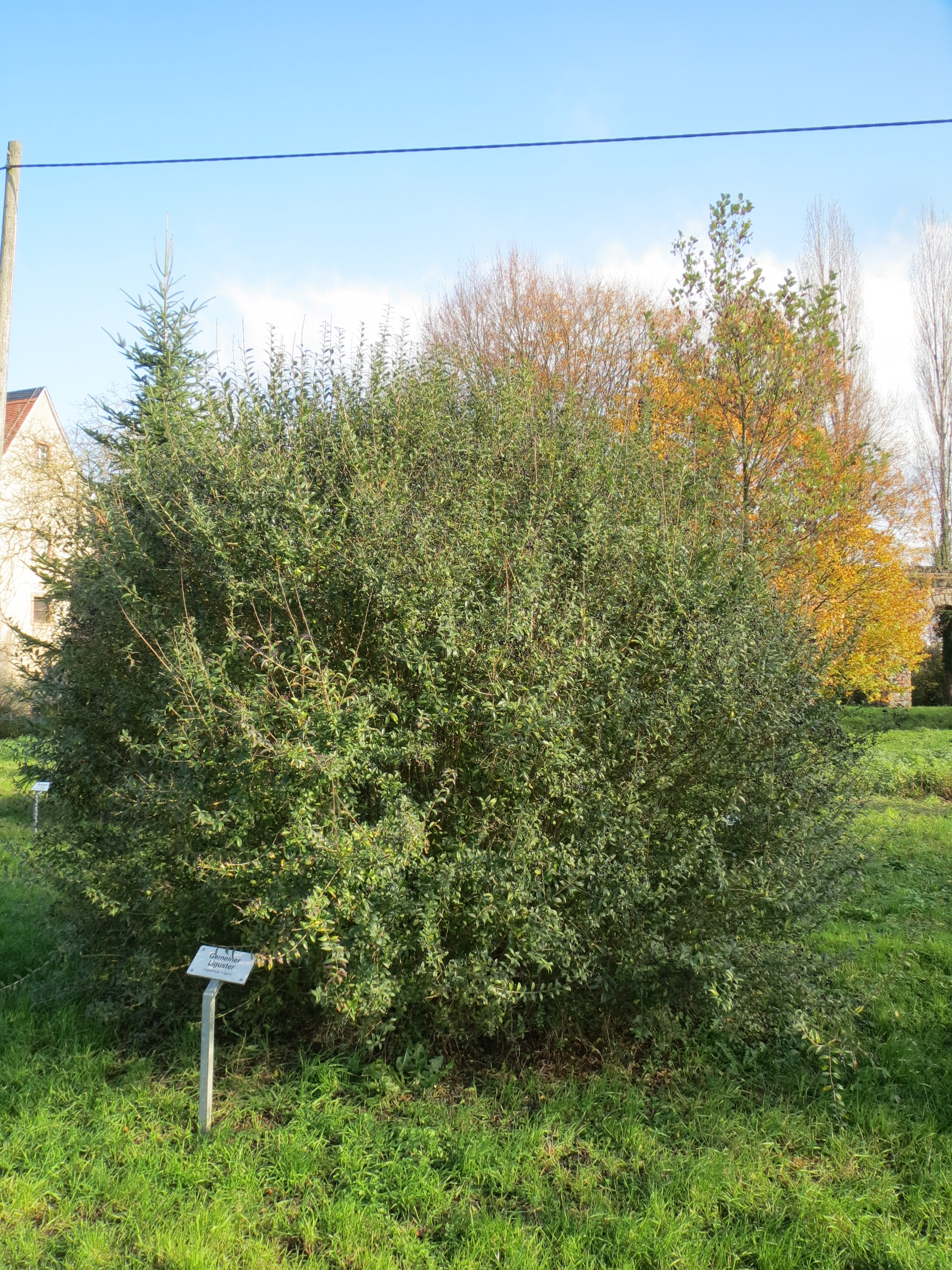 Gewöhnliche Liguster (Ligustrum vulgare) bei Schwetzingen